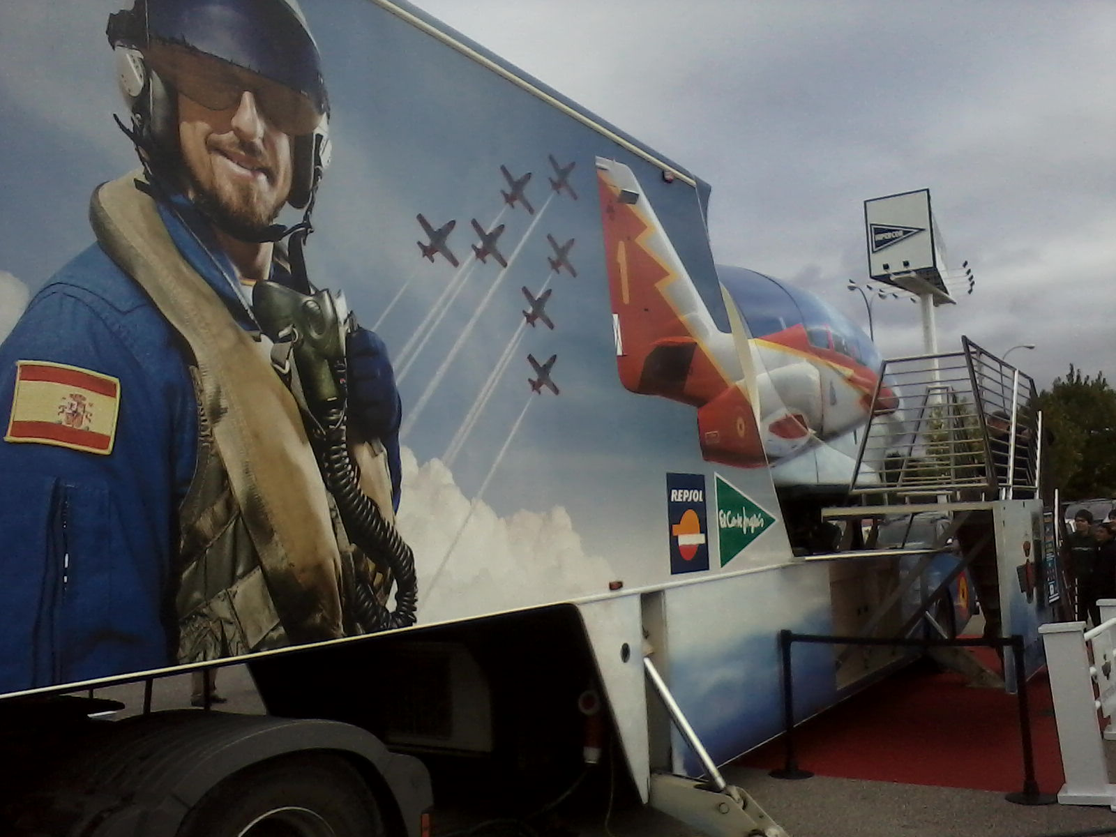 Simulador aéreo de la Patrulla Águila. (Ejército del aire en España)